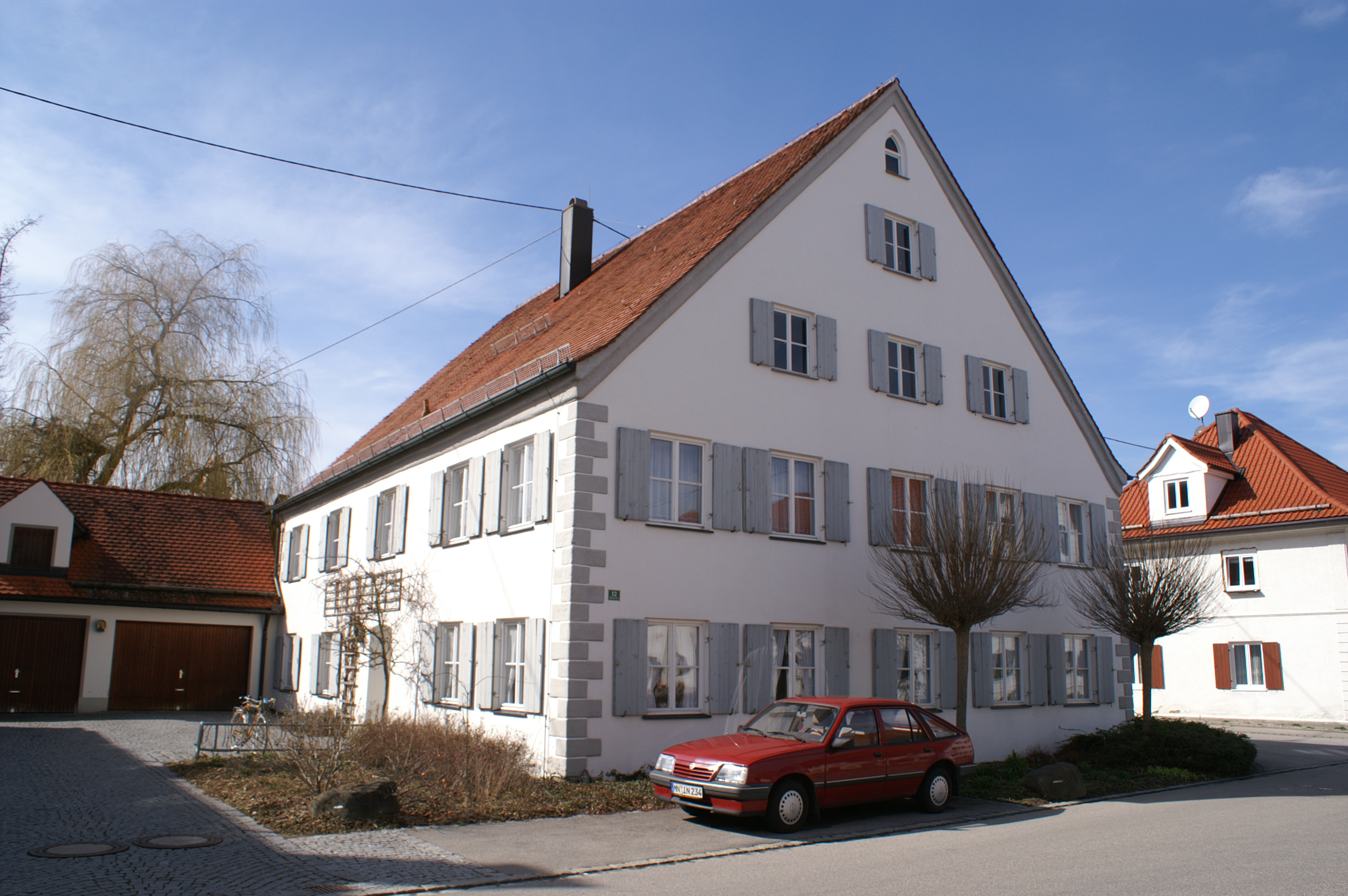 Pfarrhof in Dirlewang